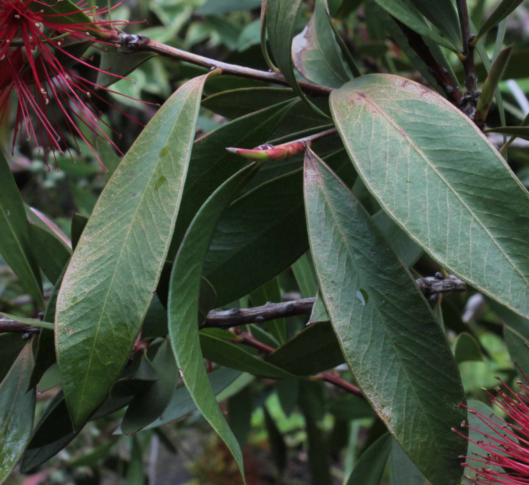 Callistemon citrinus, poškození nadbytkem slunečného záření při letnění